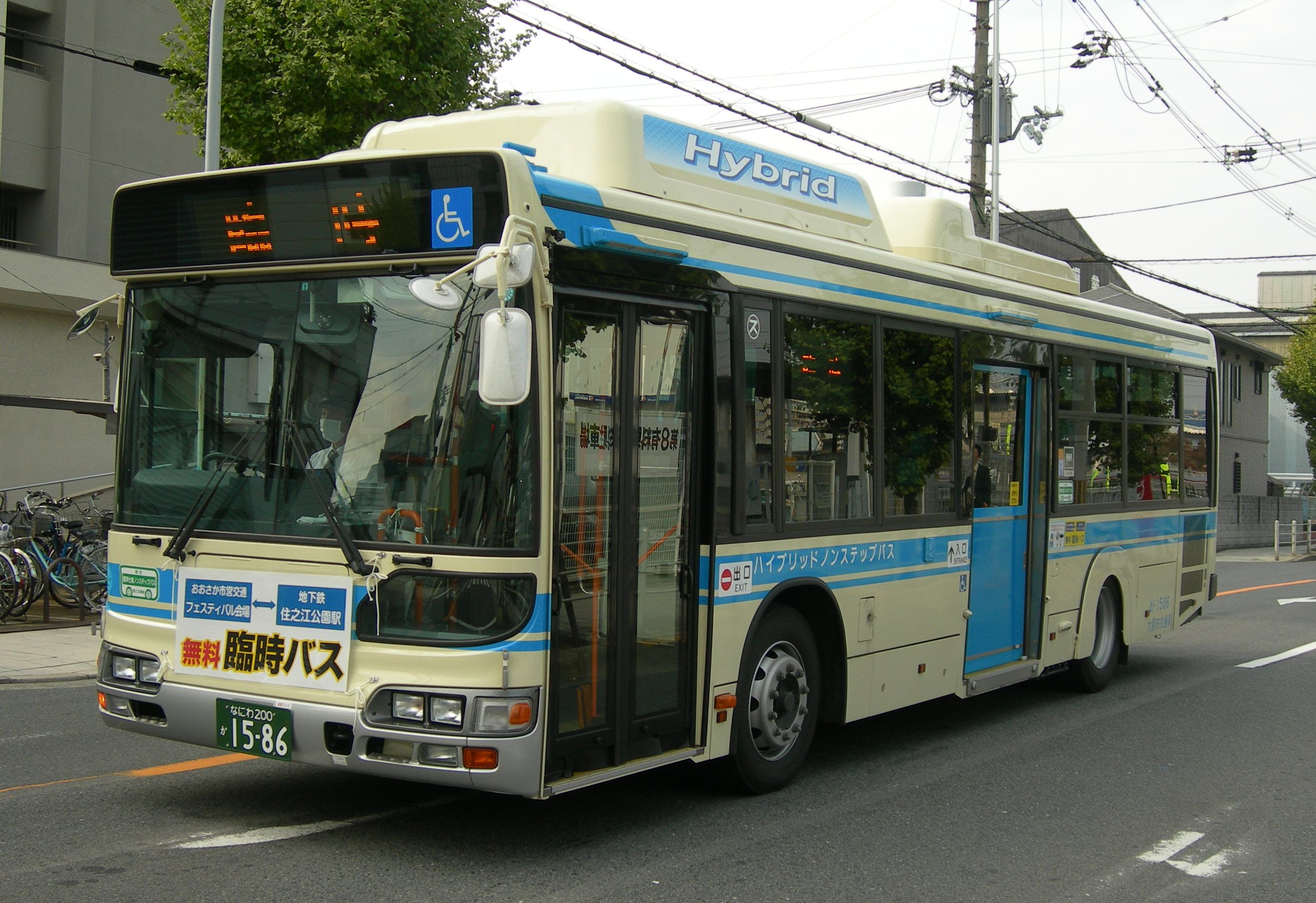 Osaka Municipal Transportation Bureau bus 大阪市営バス 路線バス車両